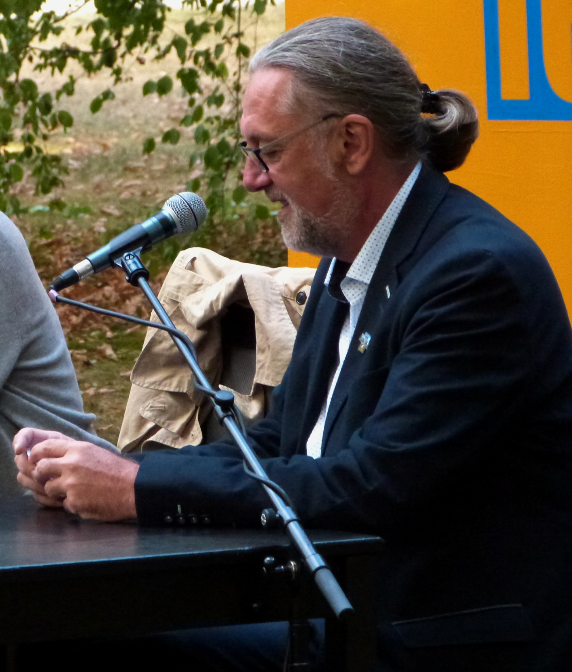 Die Schriftstellerin Angelika Klüssendorf wird von Dirk Kruse auf dem Erlanger Poetenfest 2018 interviewt.